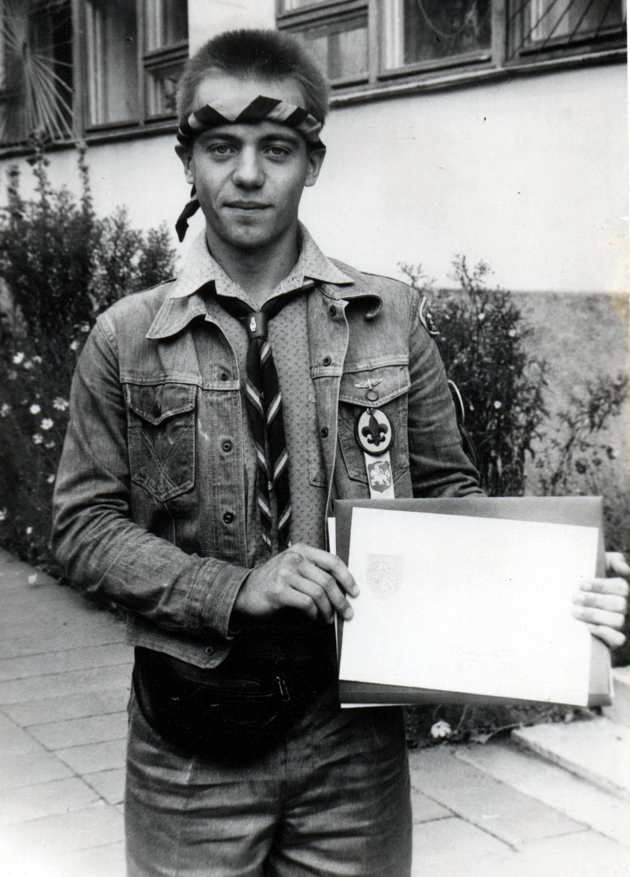 Сябра Рады АБС Алег Грушэцкі з пасведчаннем Мінюсту аб рэгістрацыі «Аб'яднання беларускіх скаўтаў» у дзень атрымання пасведчання (12.08.1992)